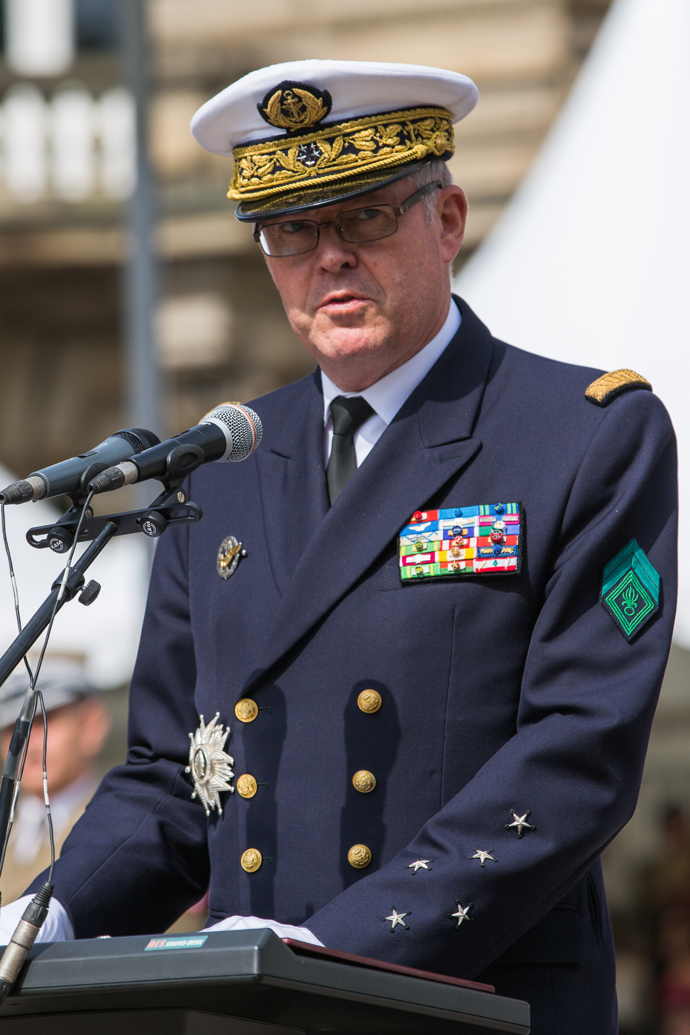 L’amiral Édouard Guillaud, chef d'Etat-Major des Armées françaises à Strasbourg le 28 juin 2013, place de la République, lors du passage de commandement à l’Eurocorps entre les généraux Olivier de Bavinchove et Guy Buchsenschmidt.